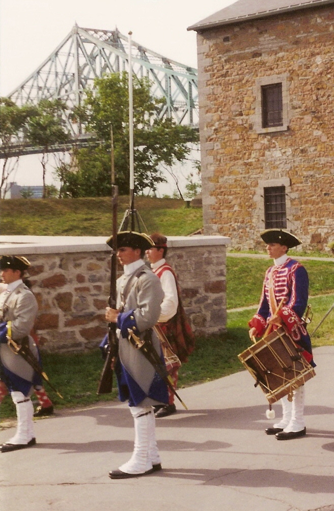 Au fort de l'Île Sainte-Hélène à Montréal, une animation par la Compagnie franche de la Marine et le 78th Fraser Highlanders